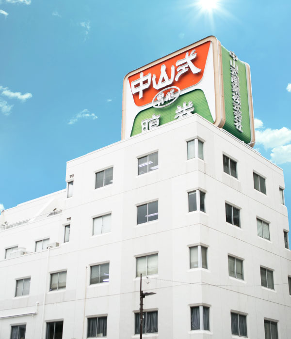 中山式産業本社外観